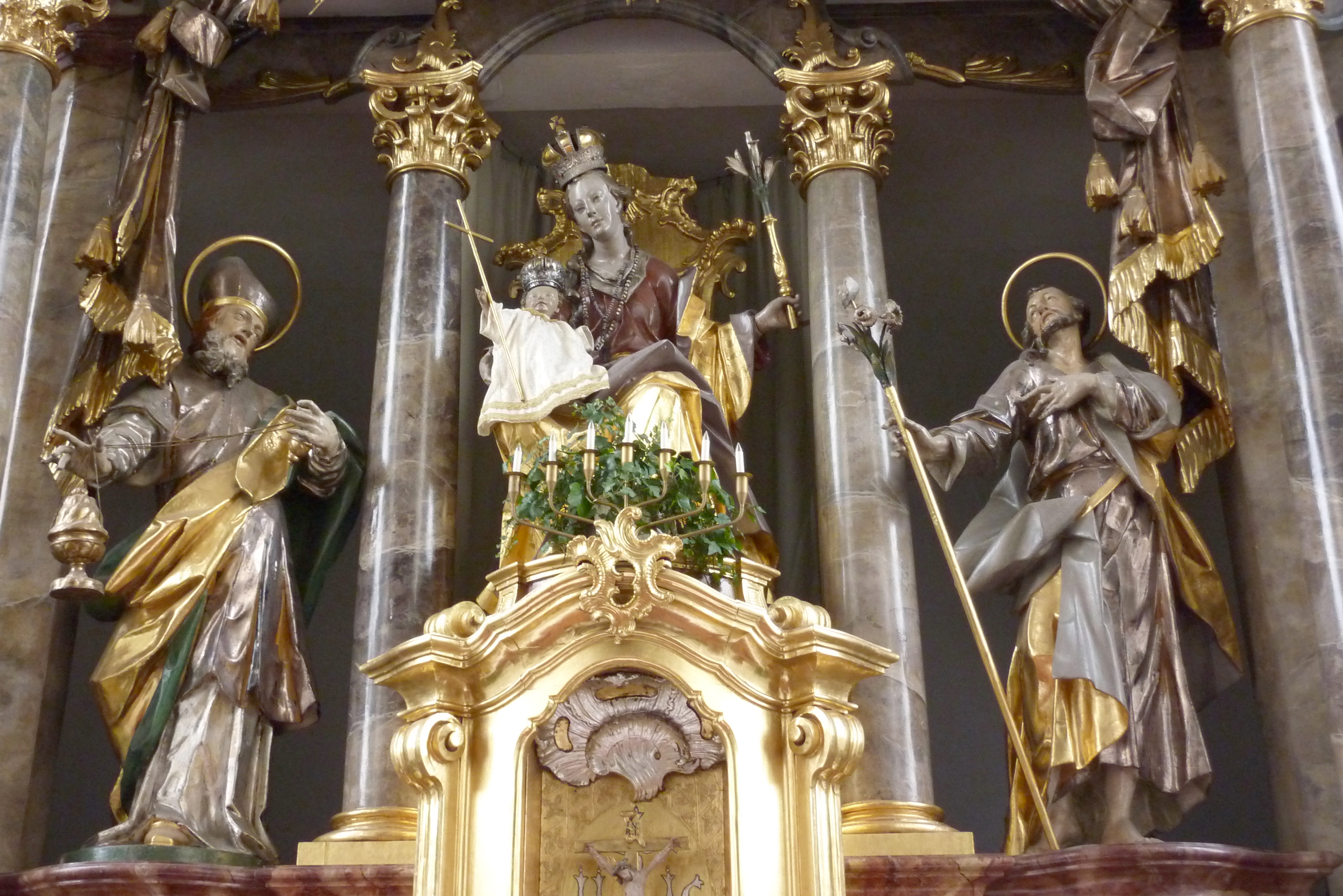 Katholische Pfarr- und Wallfahrtskirche Unsere Liebe Frau im Moos in Kicklingen (Dillingen an der Donau), Hauptaltar mit Skulpturen des Zacharias und des Josef, in der Mitte Gnadenbild mit Maria und Jesuskind, um 1760, von Johann Michael Fischer; die Figur des Jesuskind wird auf 1683 datiert und Johann Baptist Libigo zugeschrieben